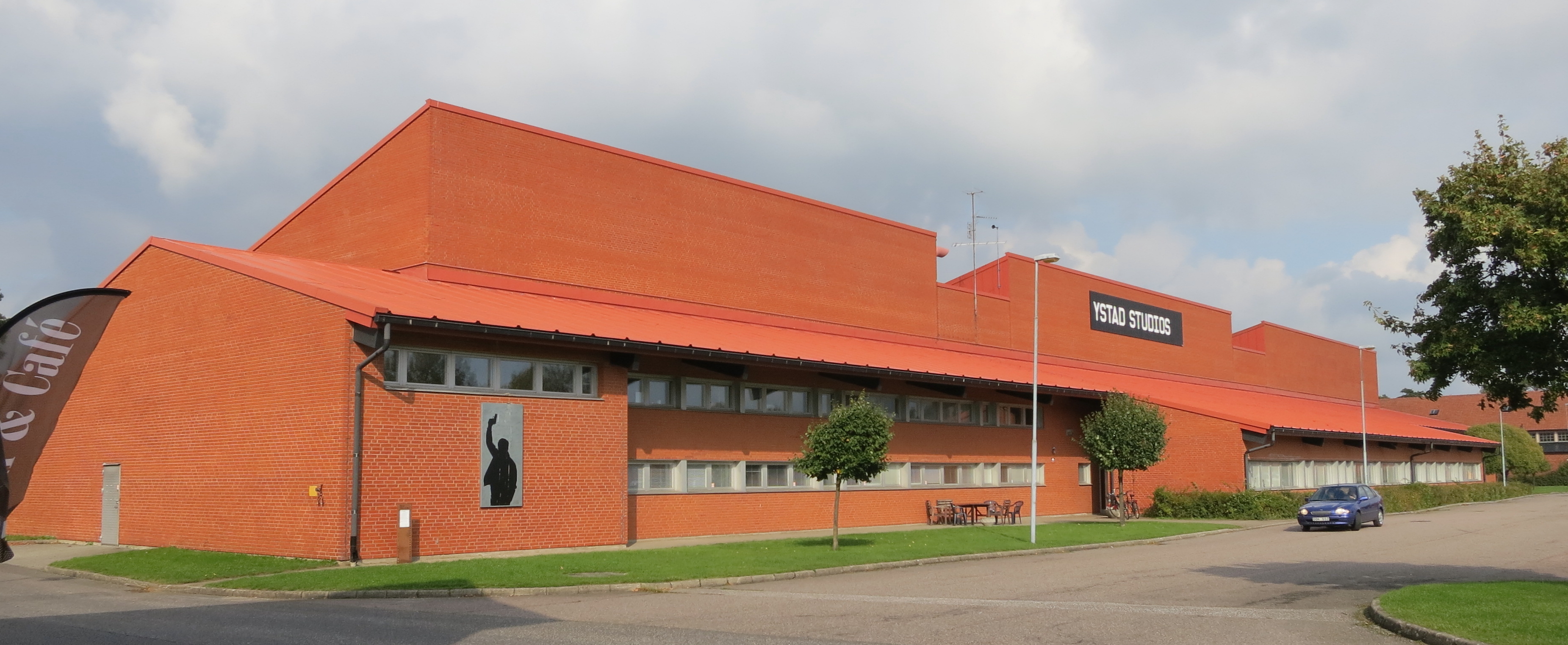 Byggnad på regementsområdet i Ystad